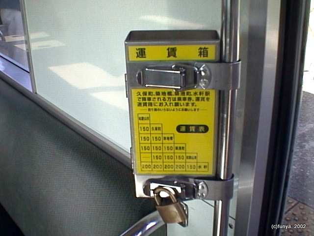 和歌山港線水軒健在末期のもの。